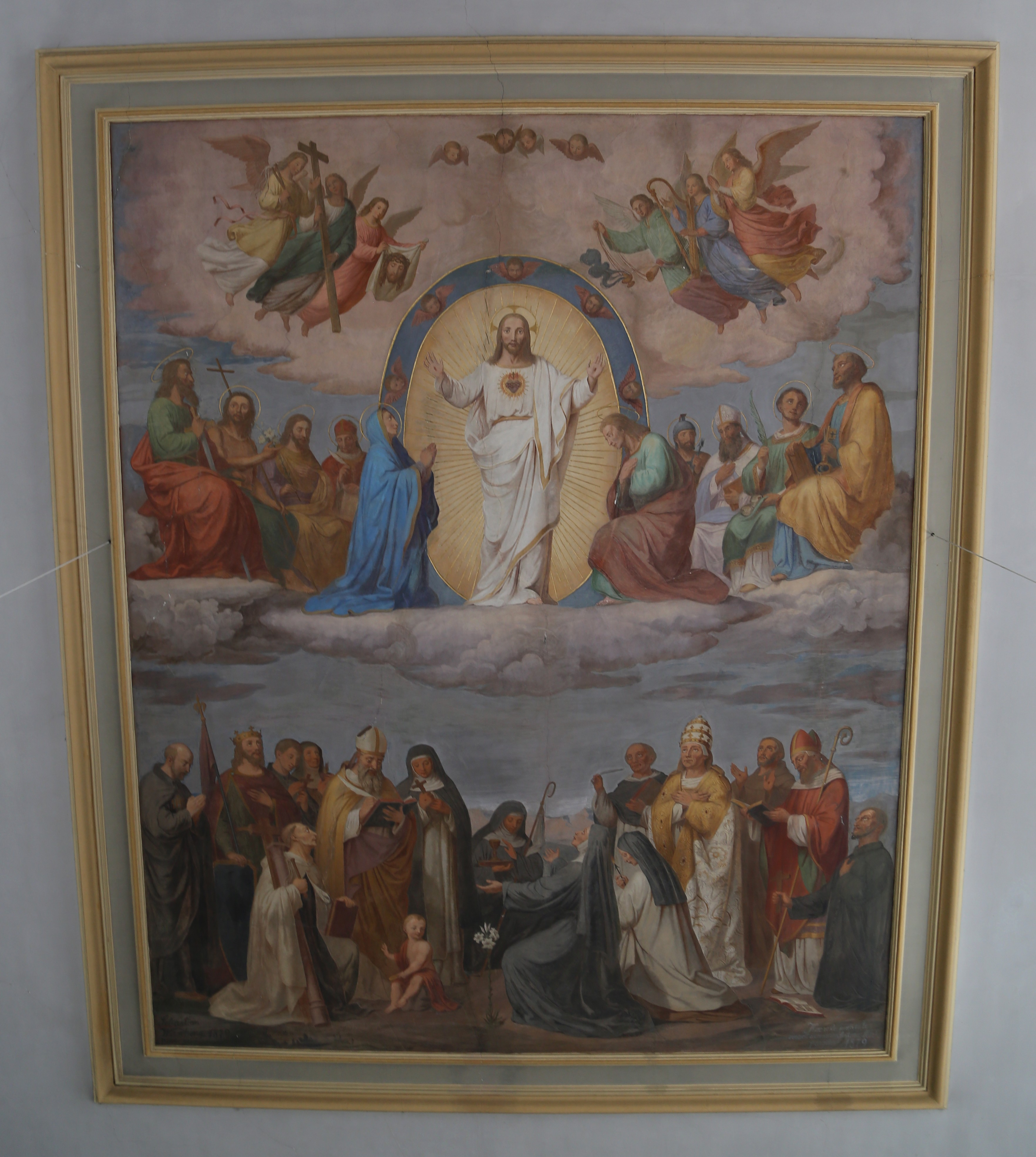 Hauptstraße 4, Hohenkammer; Kath. Pfarrkirche St. Johannes Evang., Saalbau mit spätgotischem eingezogenem polygonalem Chor und neu errichtetem Langhaus von 1813, Chorflankenturm im Erdgeschoss 14. Jh., Erhöhung um 1620; mit Ausstattung